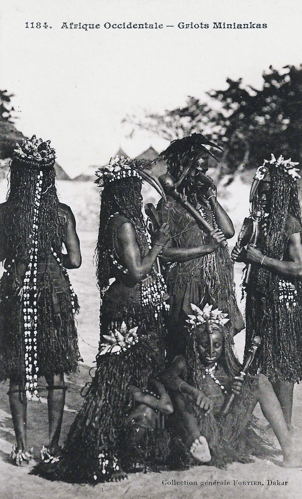 Griots Miniankas. Afrique Occidentale. .